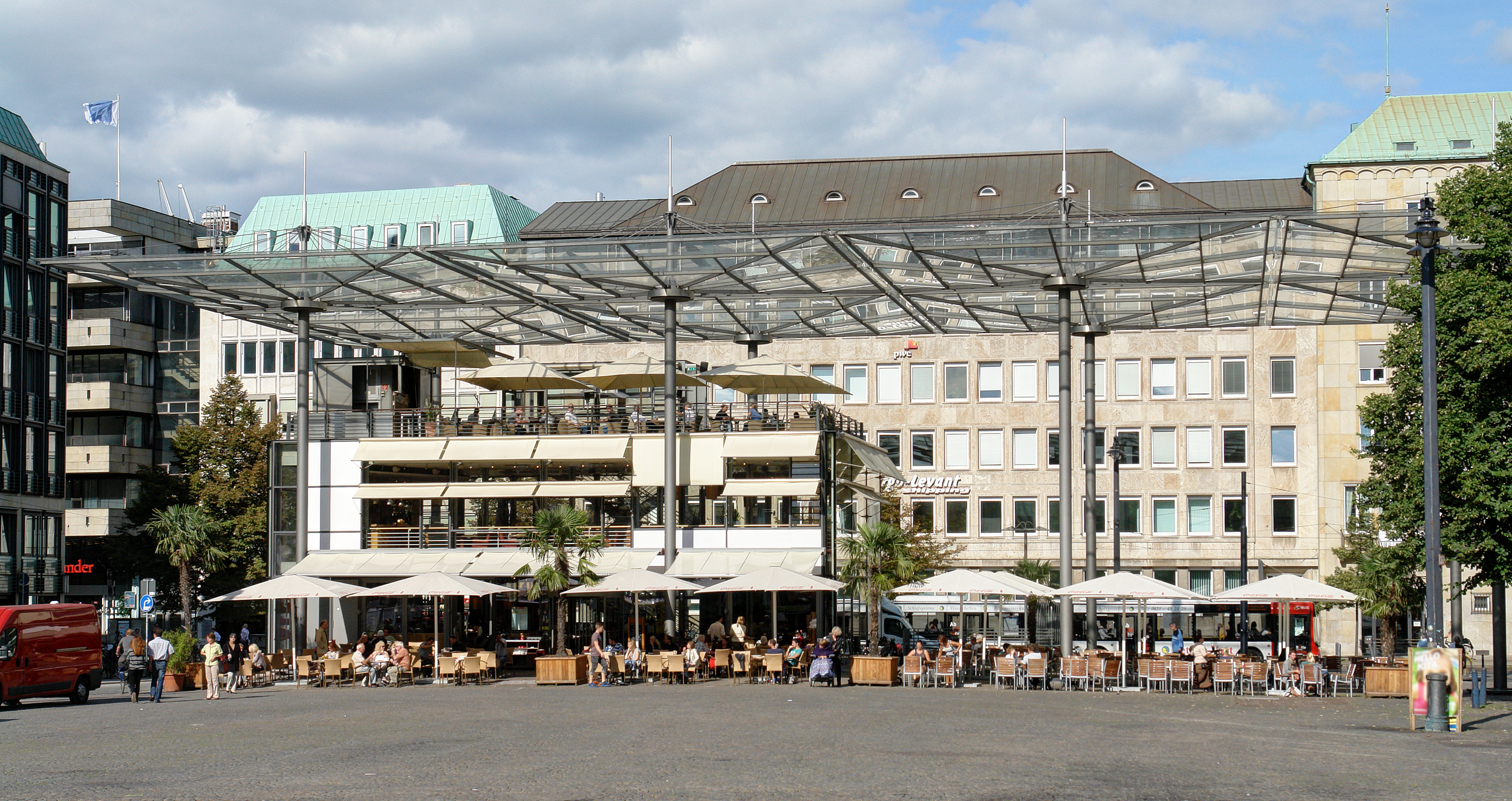 Forum Domshof auf dem Domshof, Bremen Mitte. Errichtet 1998/99. Architekt: Joachim Schürmann